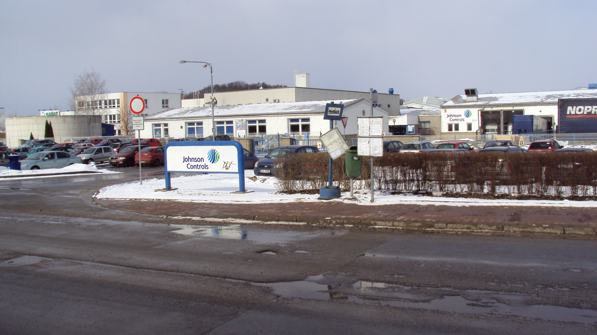 Česky: Část areálu největší firmy České Lípy, Johnson Controls